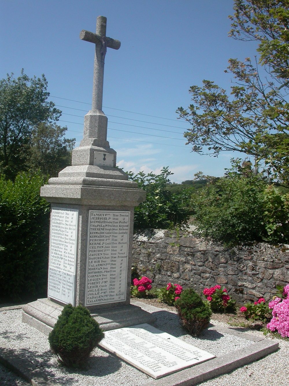 Monument aux morts - Landunvez-29